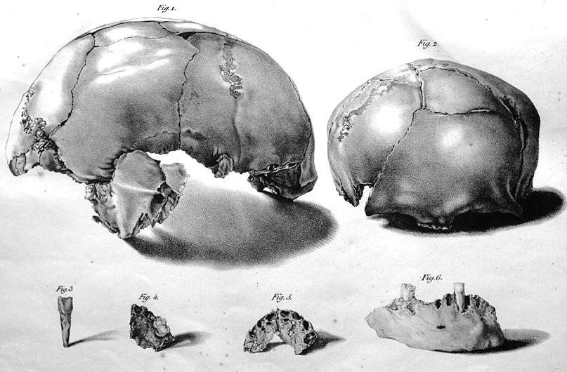 Planche I illustrant Philippe-Charles Schmerling, Les recherches sur les ossements fossiles découverts dans les cavernes de la Province de Liège, Liège, P.J. Collardin, 1833-1834. Selon la légende : 1 - Crâne fossile humain, vu de profil = Engis I 2 - le même, vu de face 3 - Dent incisive supérieure humaine 4 - Frangment de la mâchoire supérieure humaine 5 - Les os maxillaires d'un individu jeune = celui de Engis 2, première trace trouvée d’un Néandertalien 6 - Fragment de la mâchoire inférieure humaine